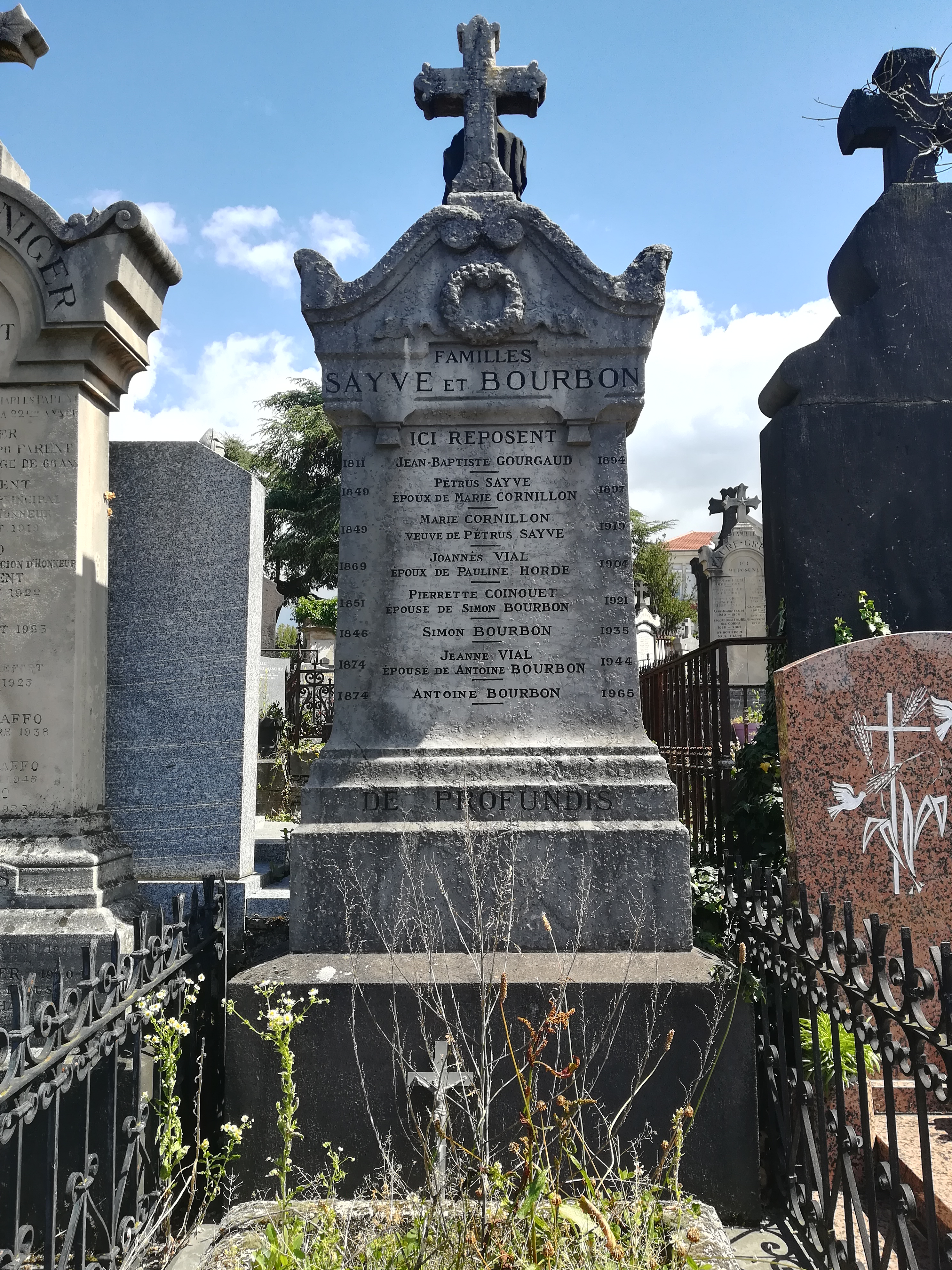 Tombe du photographe Pierre Sayve (1849-1897) et de son épouse Marie Cornillon située dans le cimetière du Crêt de Roch à Saint-Étienne.